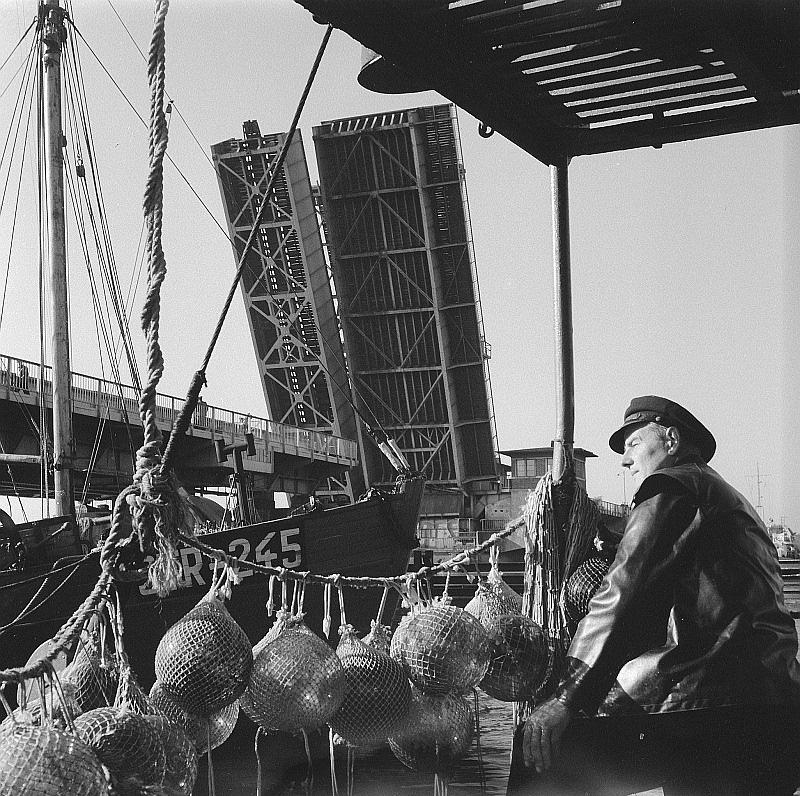 Original image description from the Deutsche Fotothek Stralsund. Rügendamm-Brücke, geöffnet, im Vordergrund Segelschiffe